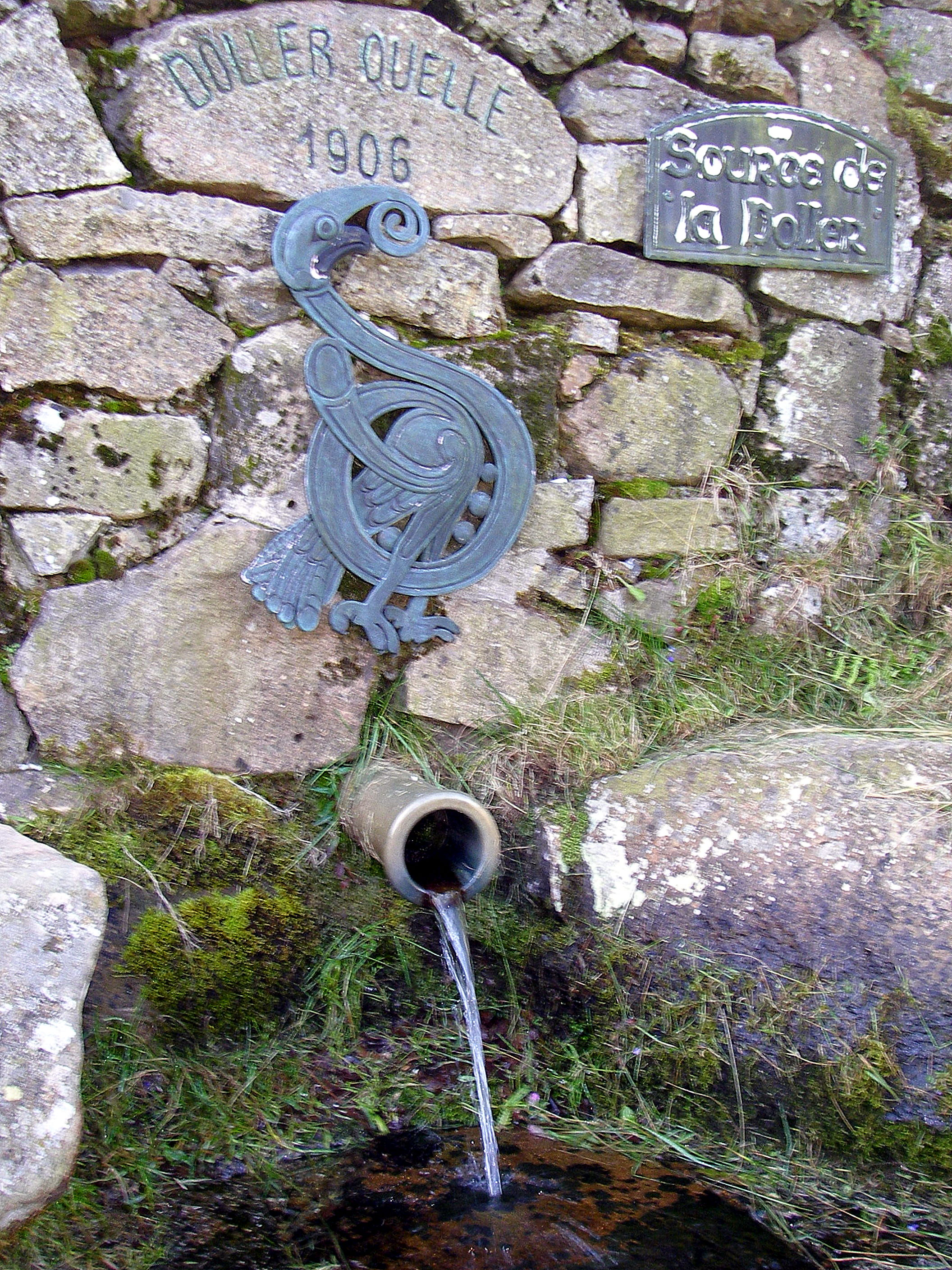 La source de la Doller, à la Fennematt (922 m; Haut-Rhin, France)